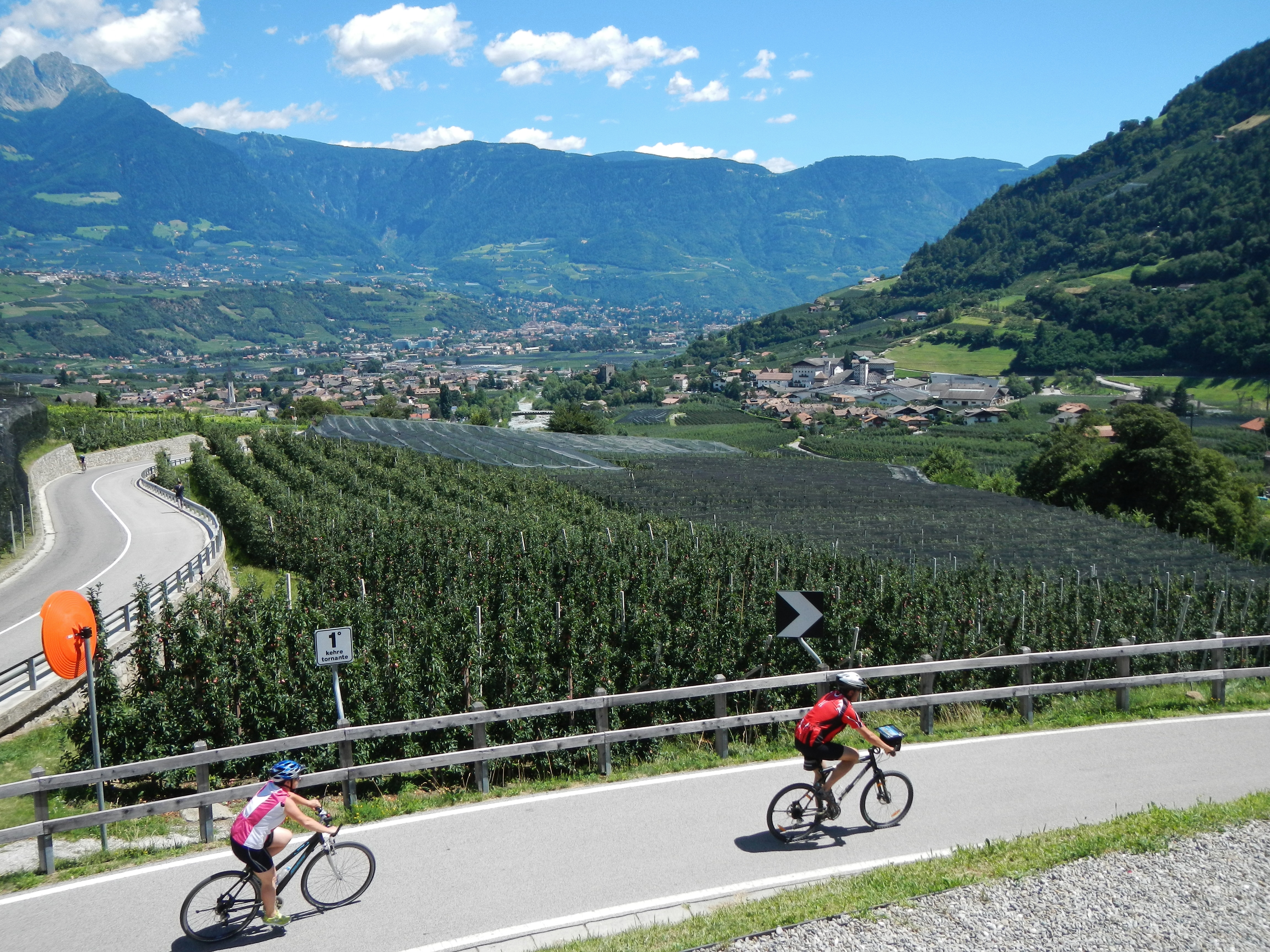 Ausblick Richtung Meran